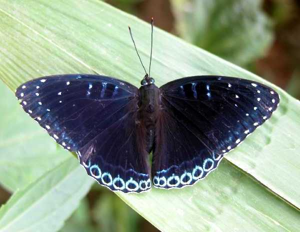 Popinjay (Stibochiona nicea) taken at Jairampur, Arunachal Pardesh, India.